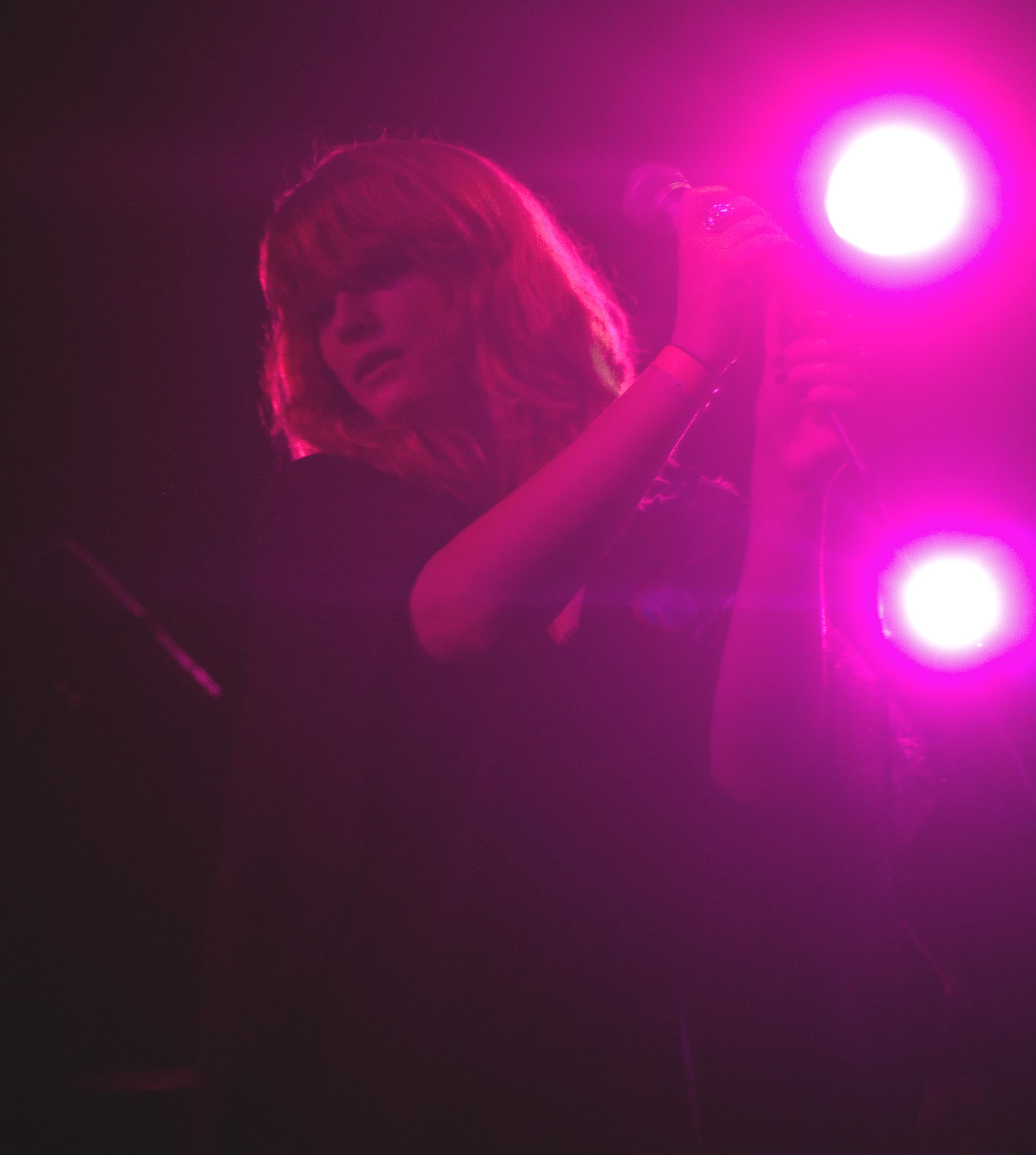 Parallels_1_crop.jpg